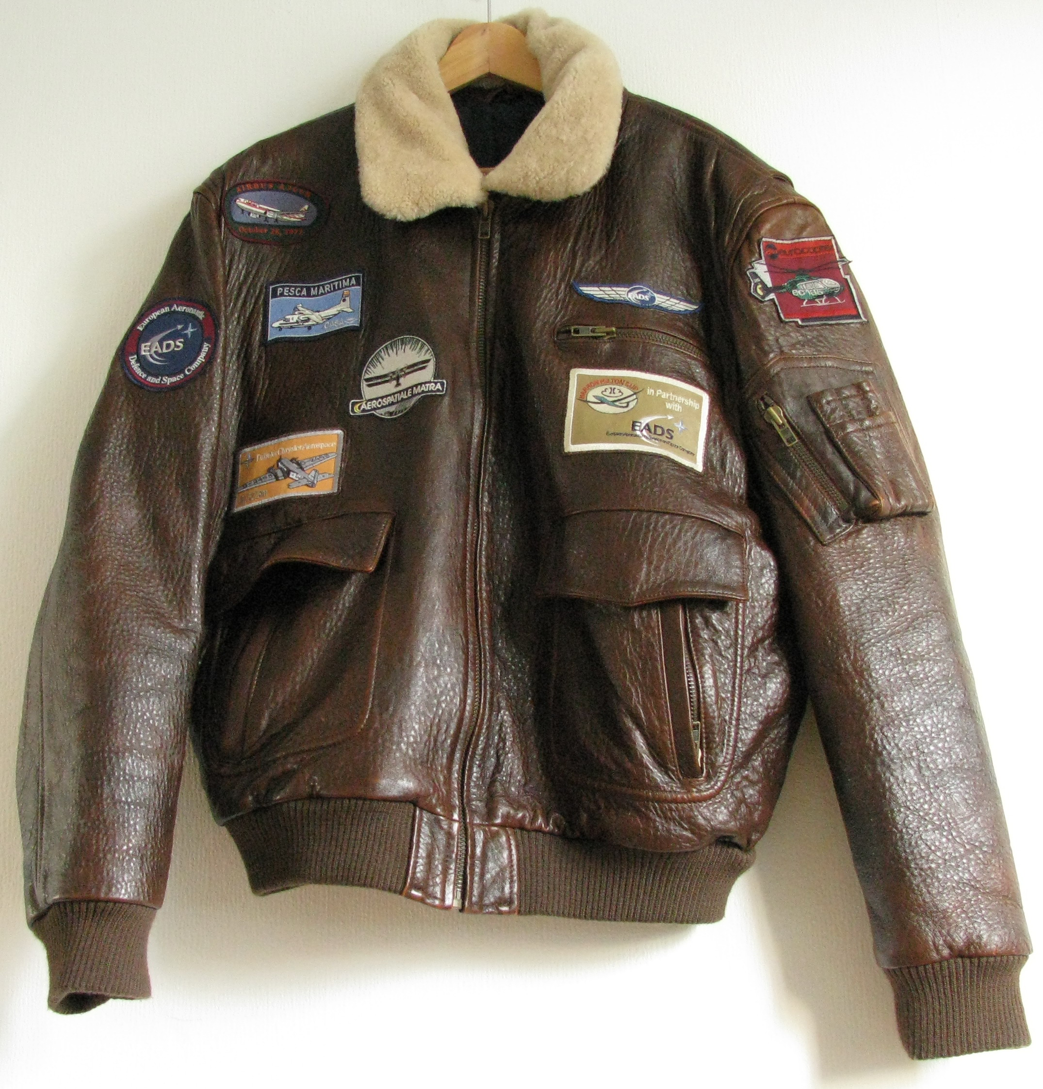 Fliegerjacke, die ein Gewinner des Barron Hilton Cups erhält